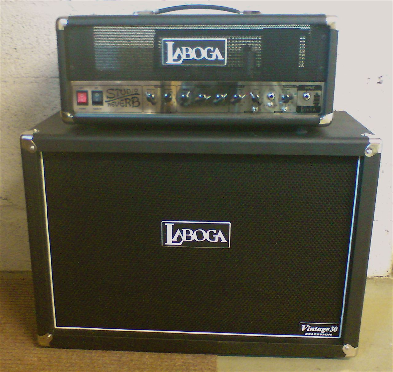 Laboga amp 50w